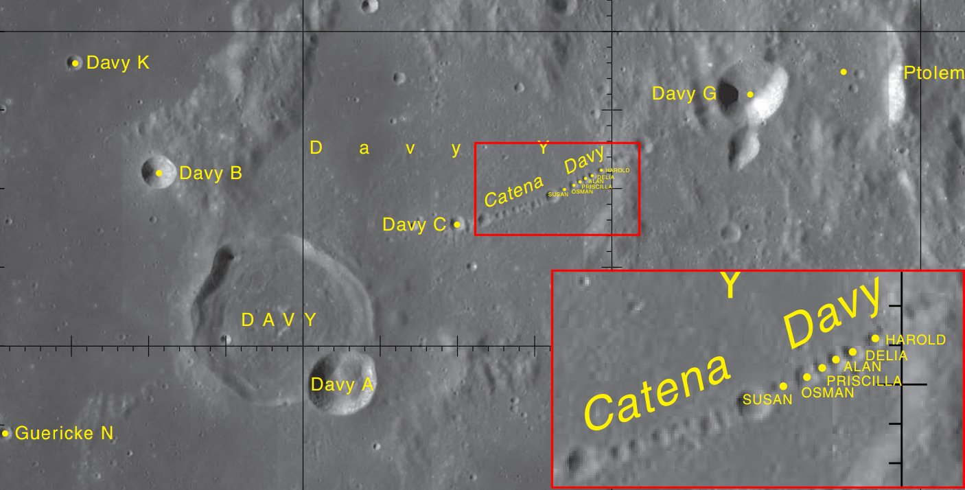 Catena Davy, junto al cráter lunar Davy. Detalle. (LRO)